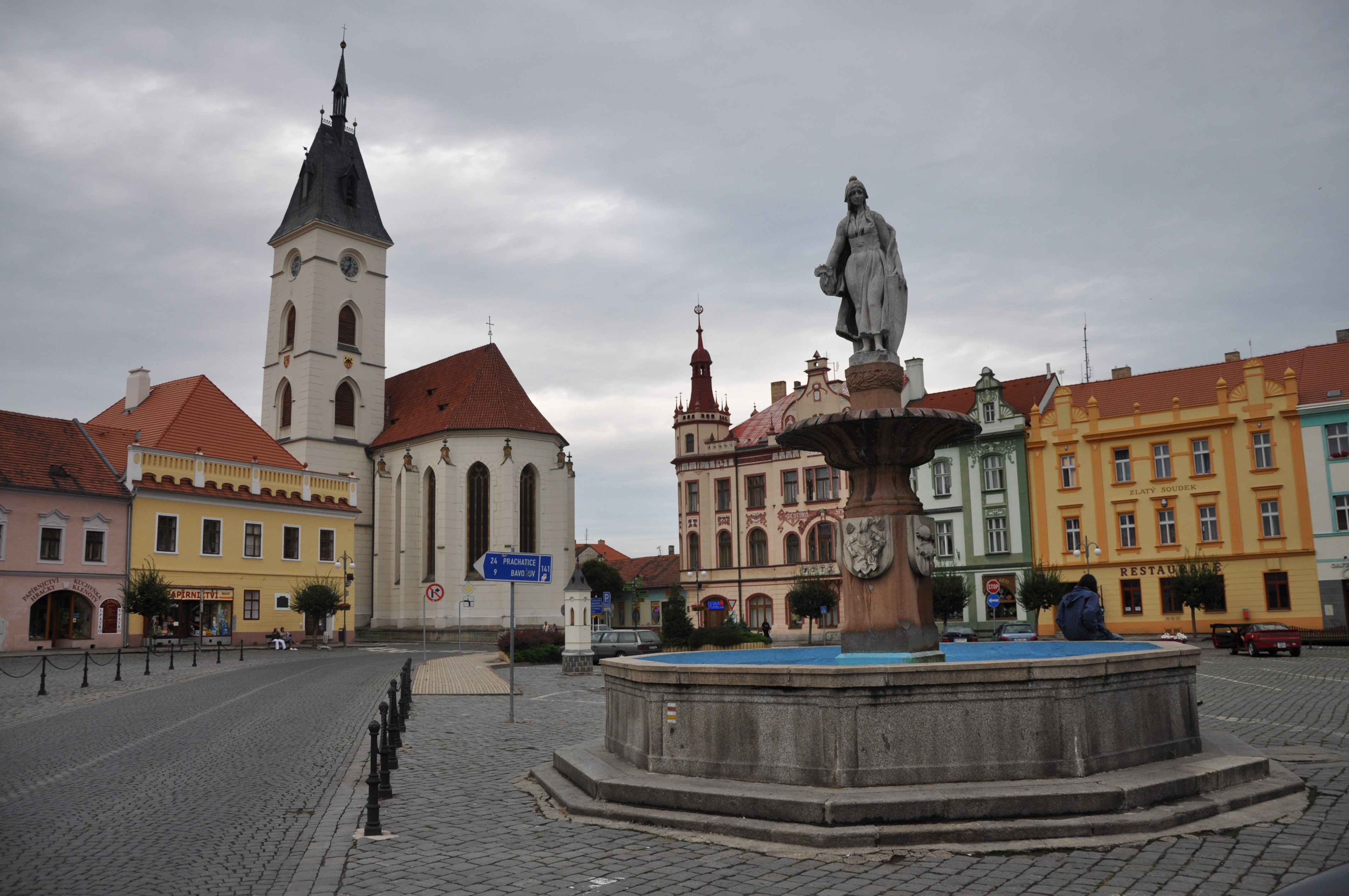 Náměstí ve Vodňanech, Jihočeský kraj